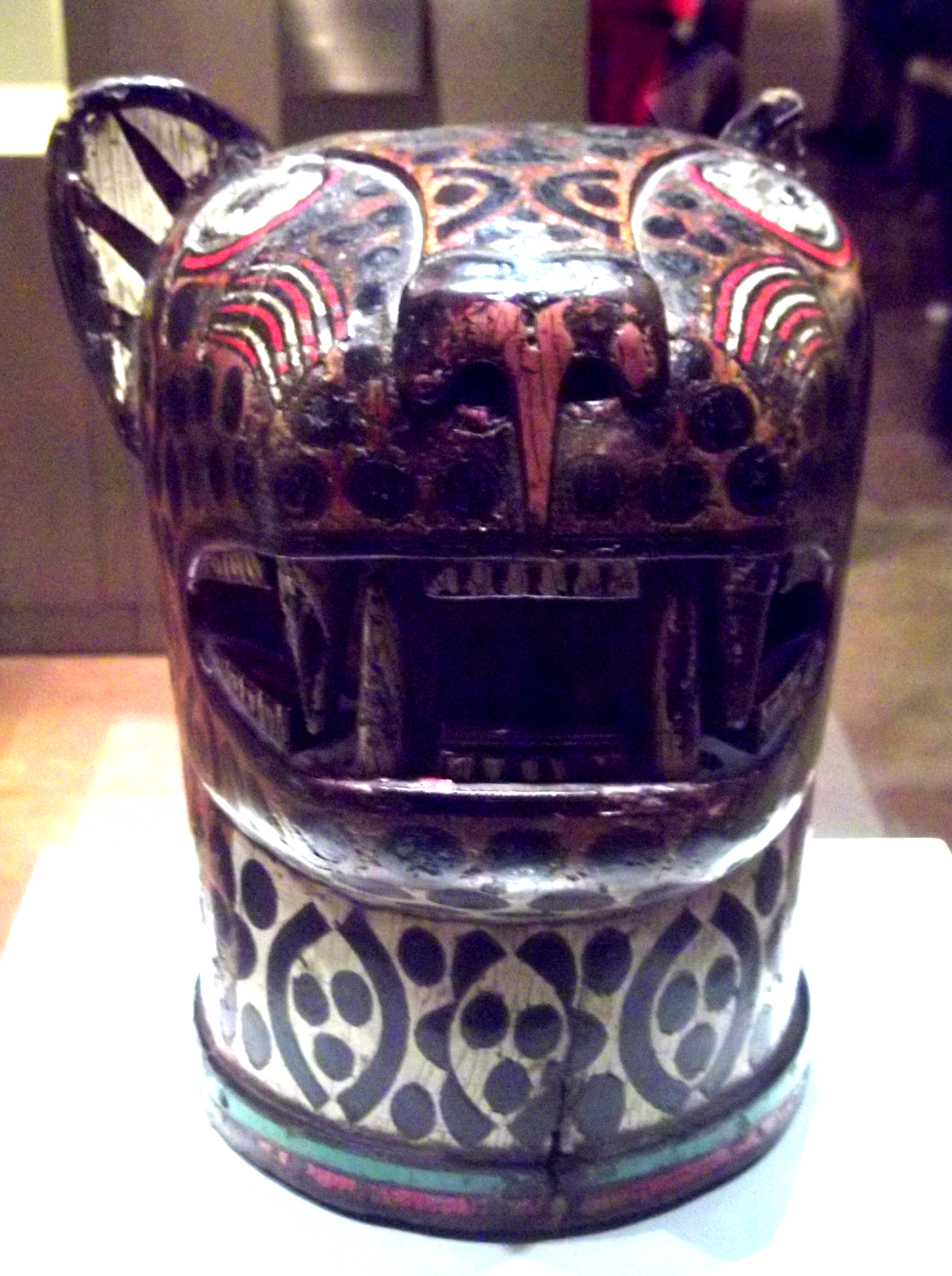 Quero de madera pintada de factura inca (época colonial hispana) que representa la cabeza de un felino. Este artefacto se encuentra en el Museo de América, Madrid, España.